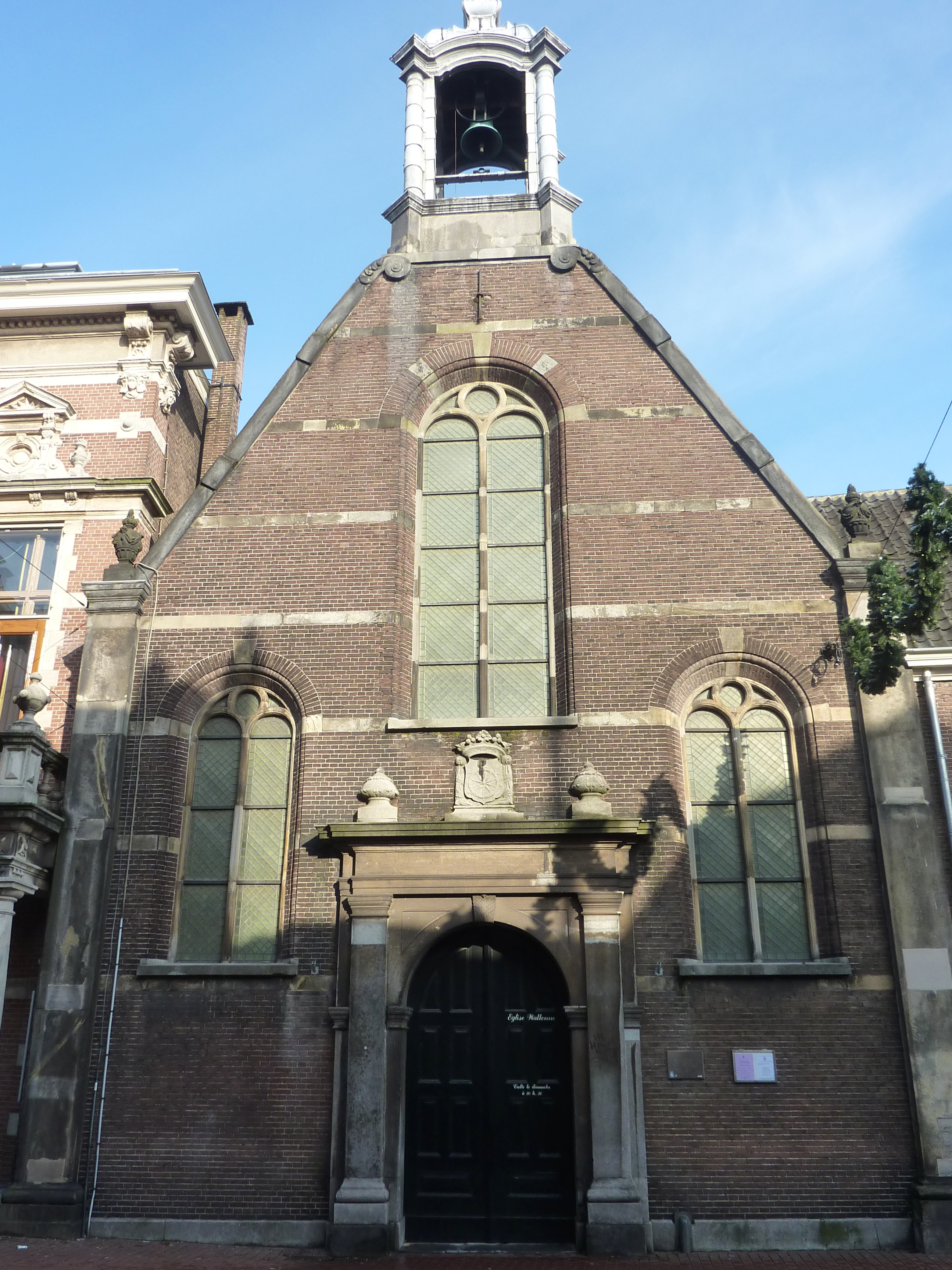 Leiden - Breestraat 62 - RM24641 - v2